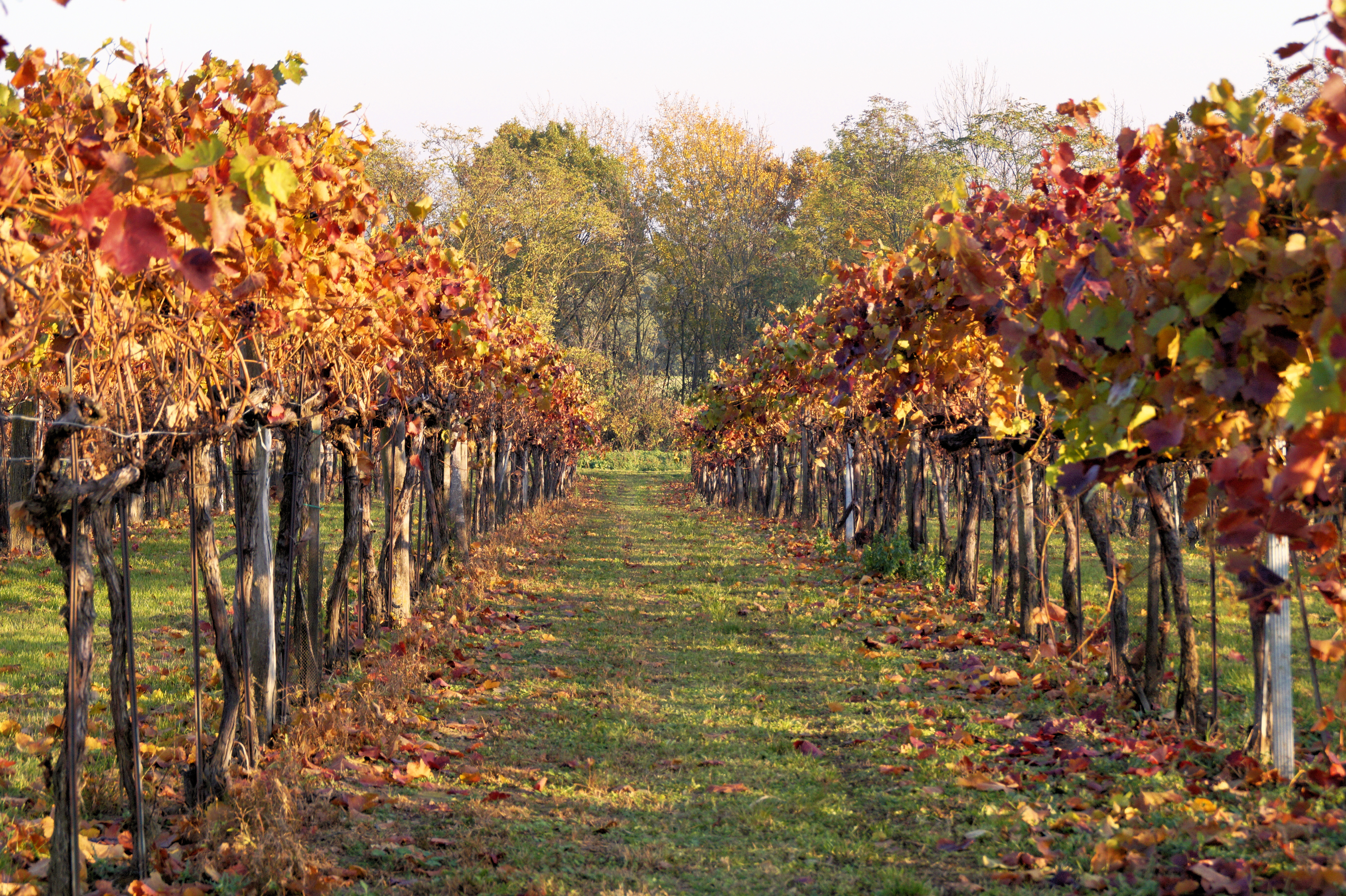 Weingarten - Hippersdorf - Nov.2015